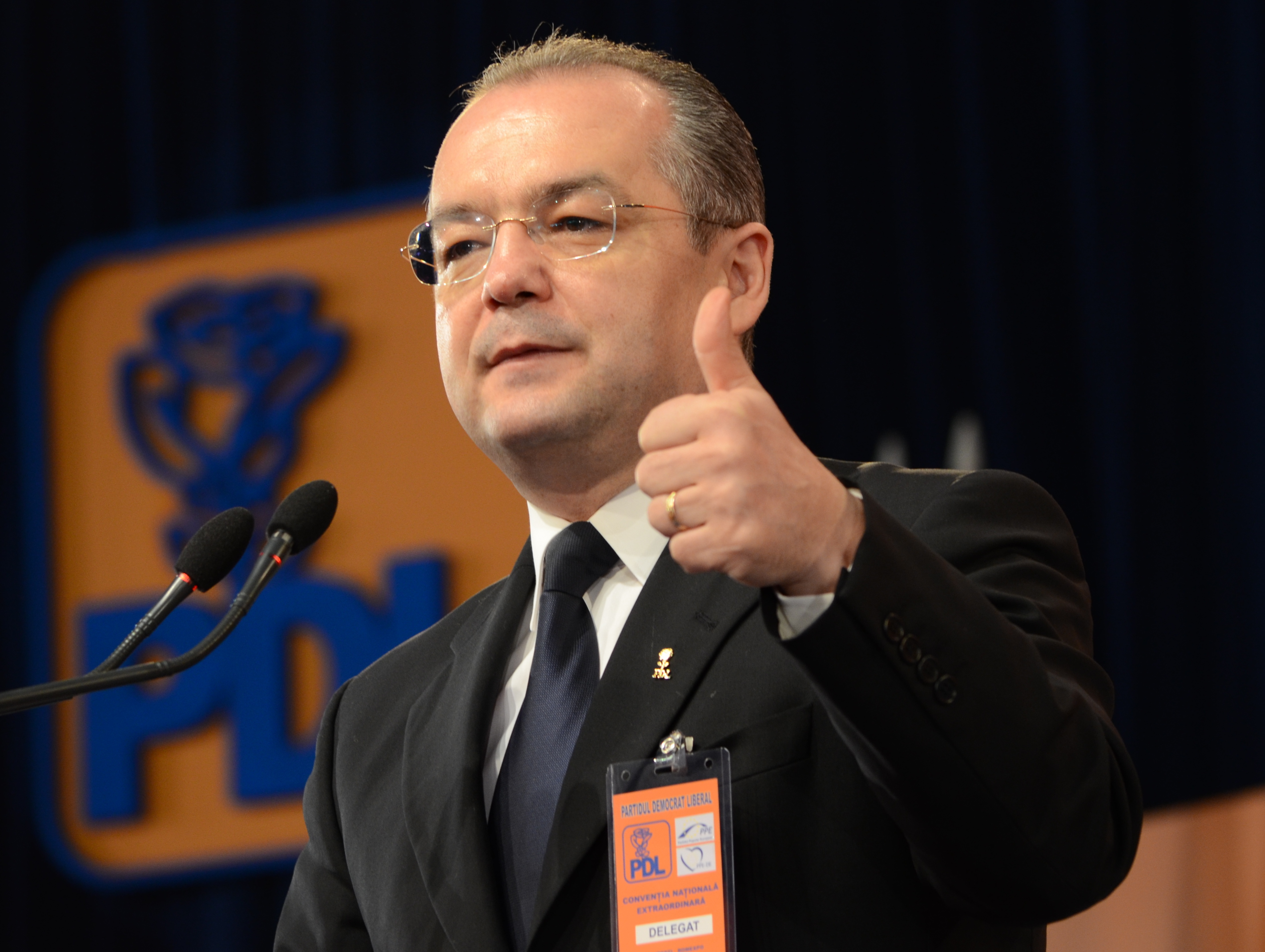 Emil Boc (la Convenția națională extraordinară a Partidului Democrat-Liberal, 23 martie 2013)